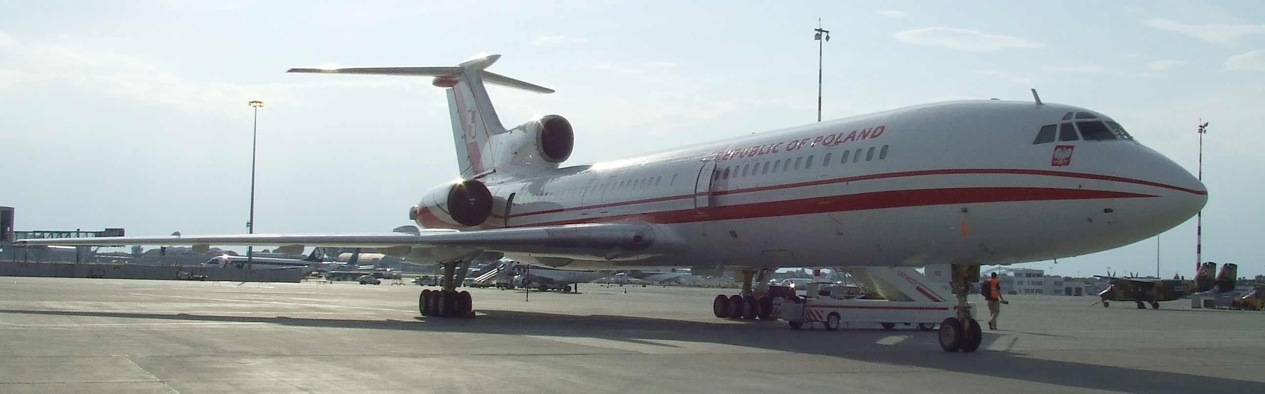 Tupolev Tu-154M of the 36th Special Transport Aviation Regiment, Polish Air Force - Republic of Poland government plane. Warszawa-Okęcie Airport. Tupolew Tu-154M z 36. specjalnego pułku lotnictwa transportowego Polskich Sił Powietrznych - samolot rządowy/prezydencki RP, lotnisko Warszawa-Okęcie